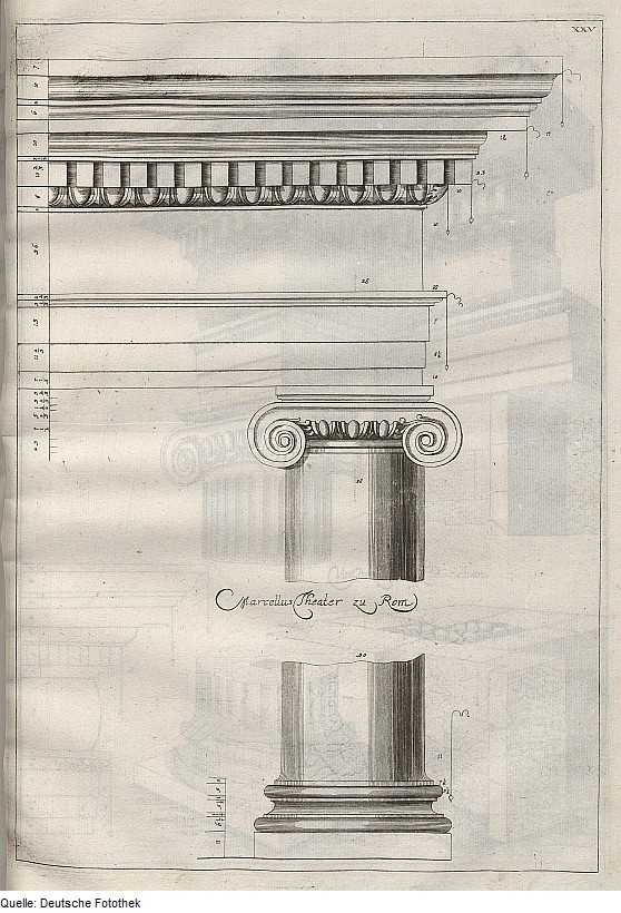 Original image description from the Deutsche Fotothek Architektur & Säule & ionische Ordnung & Theater